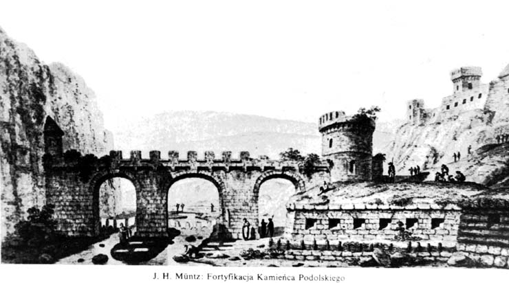 Замковий міст 1785 та башня Міської замкової брами.Первісний вигляд замкових веж.